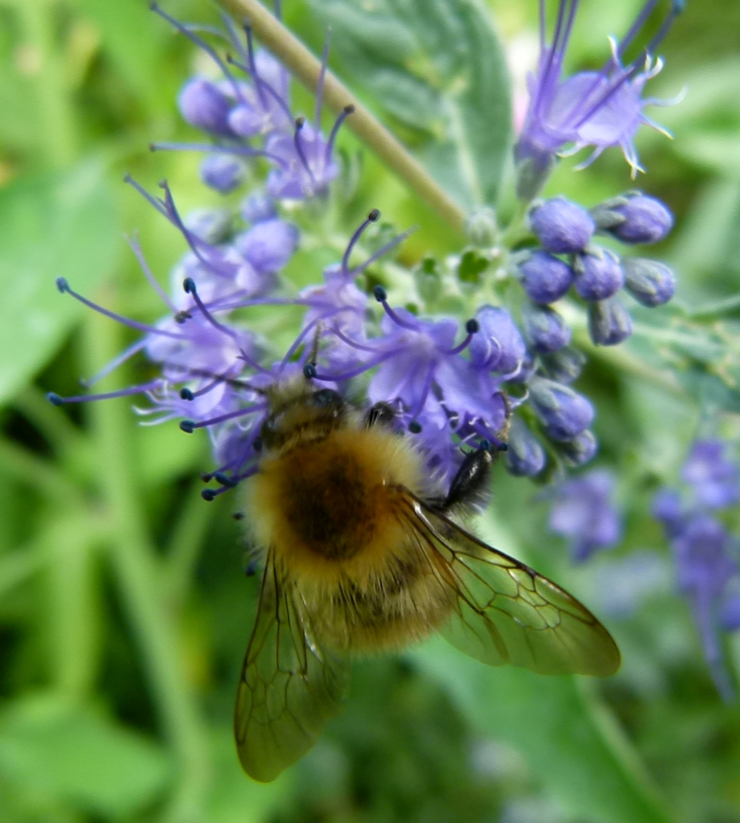 Abeille butinant une fleur